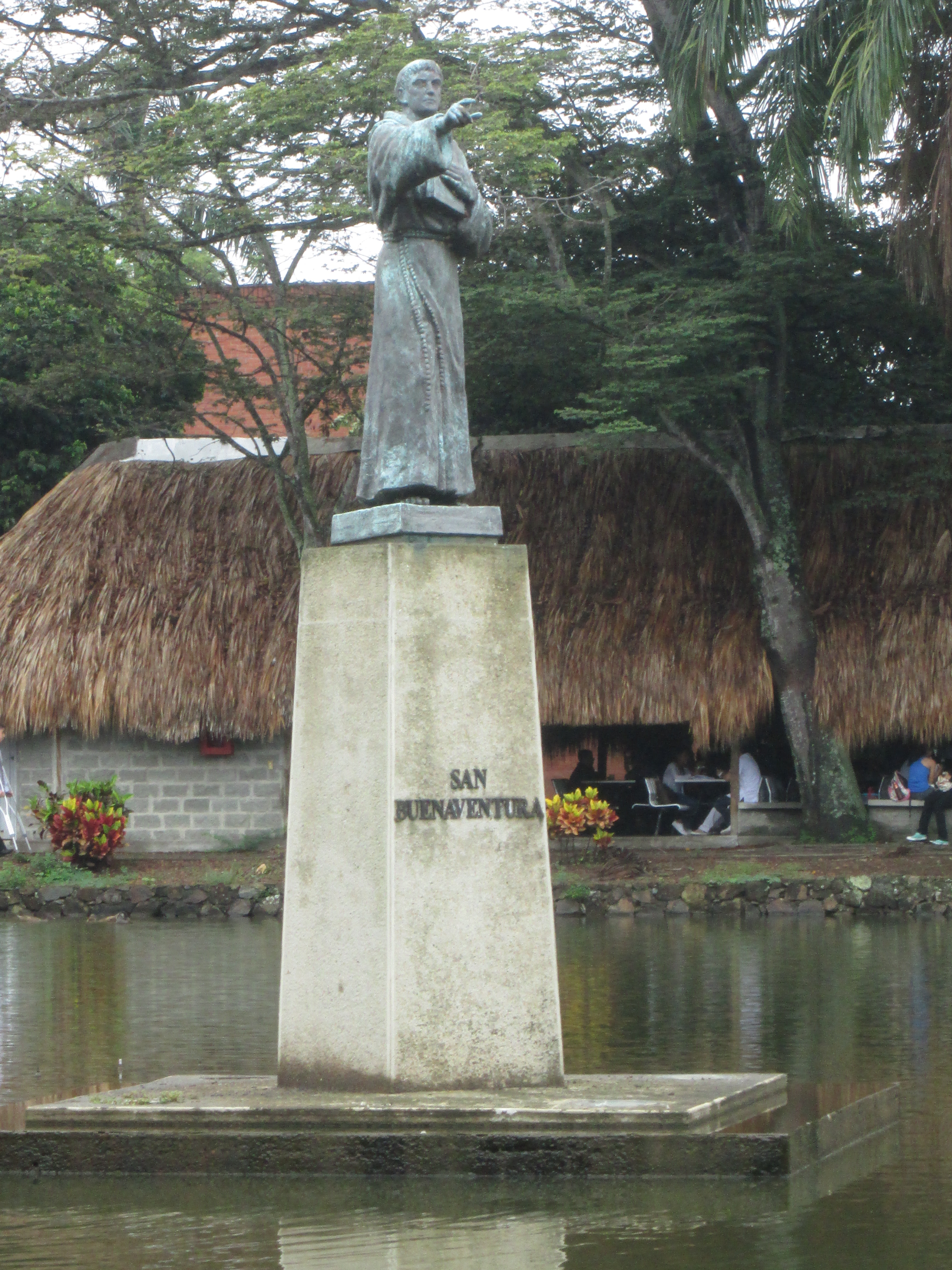 Estatua de San buenaventura en el campus de la universidad sede cali.